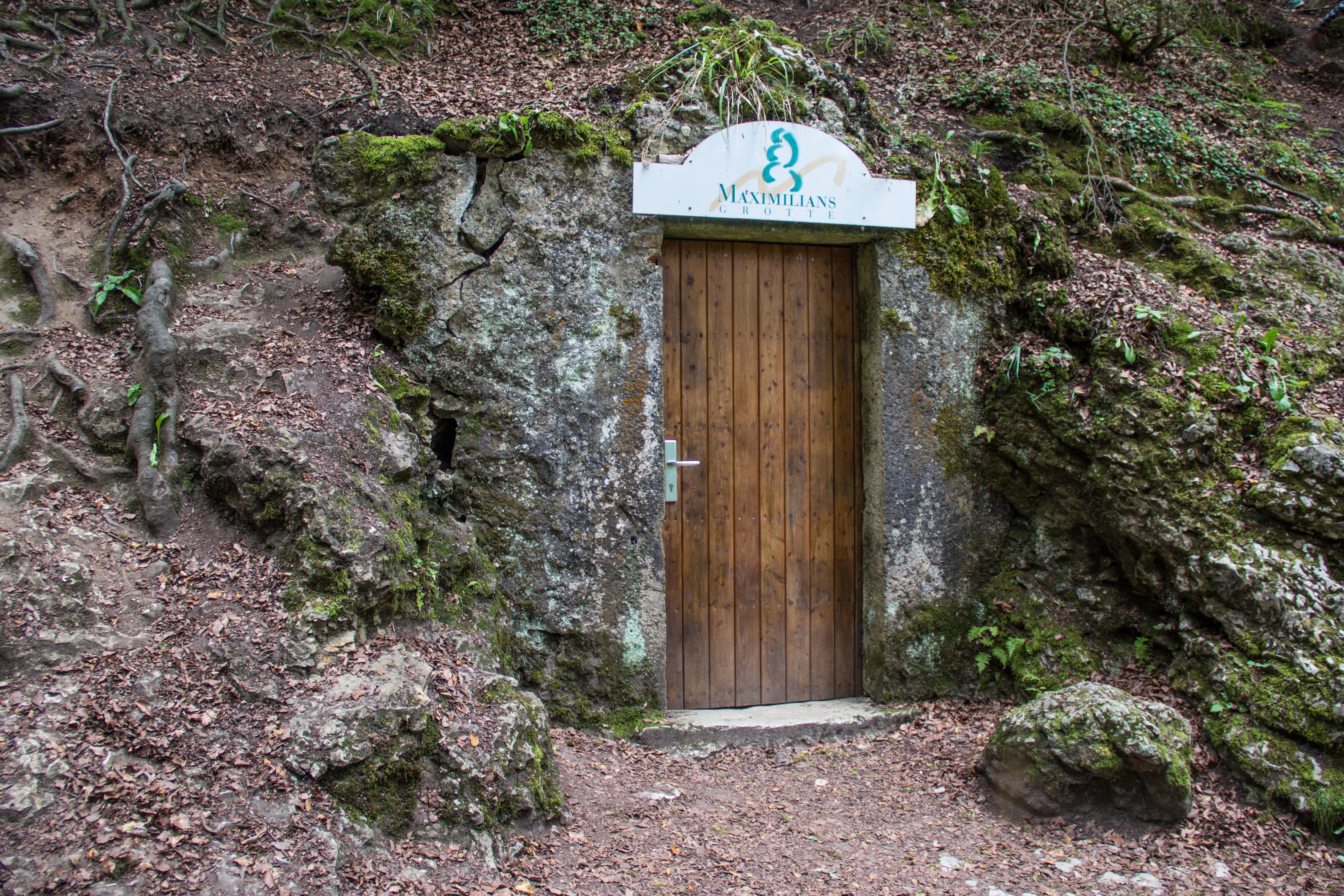 Maximiliansgrotte, Eingang